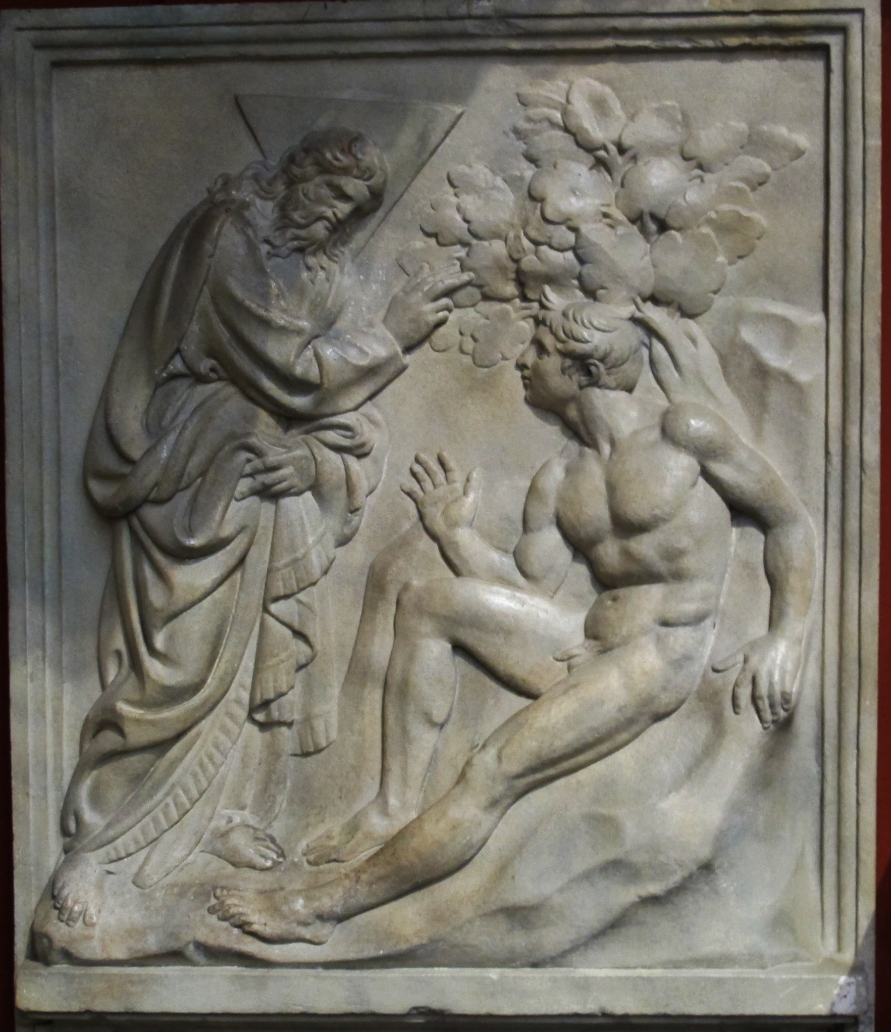 Museo pushkin, calchi, jacopo della quercia, formnelle del portale di bologna